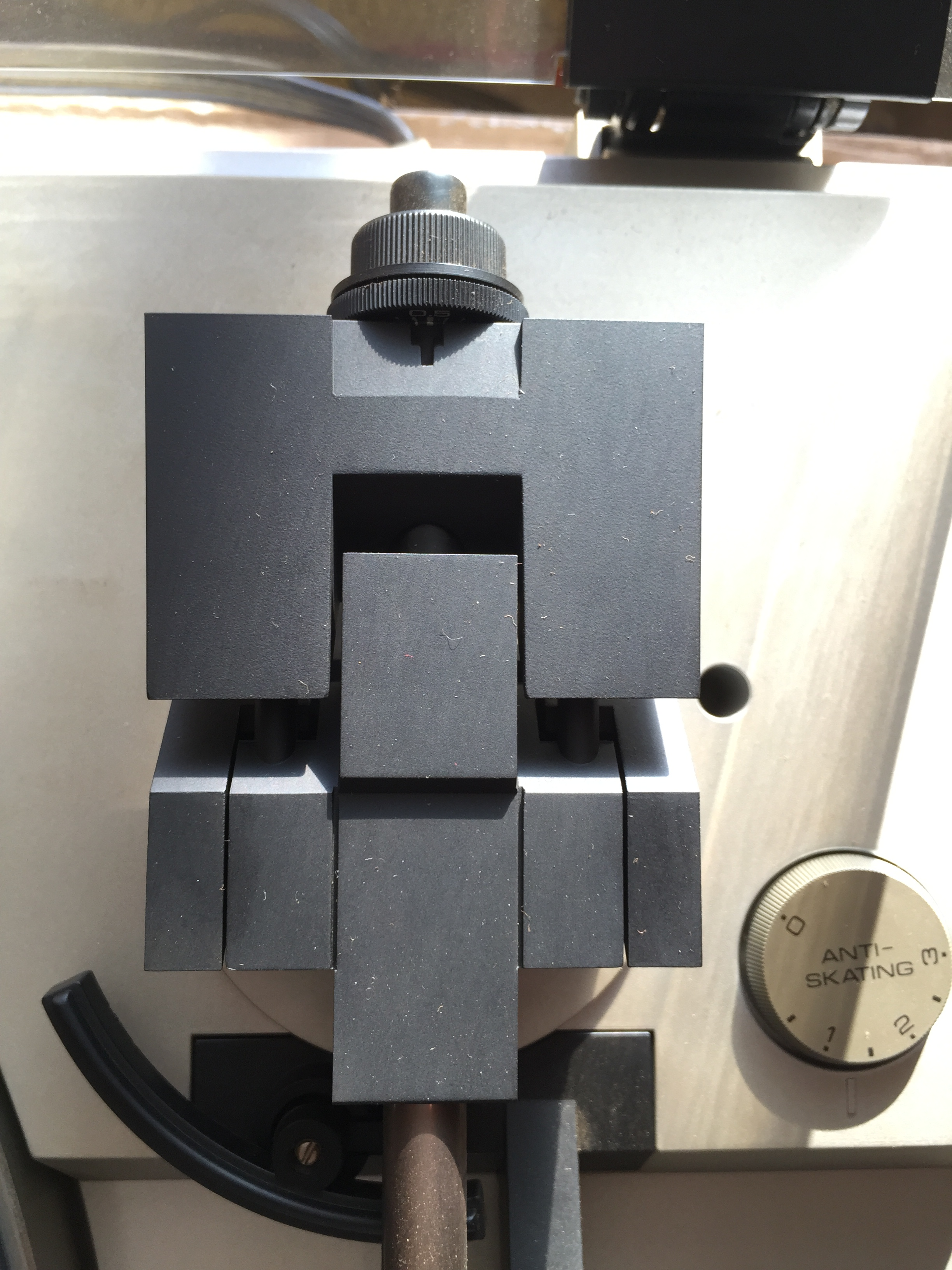 Gegengewicht Tonarm Plattenspieler Yamaha P-200